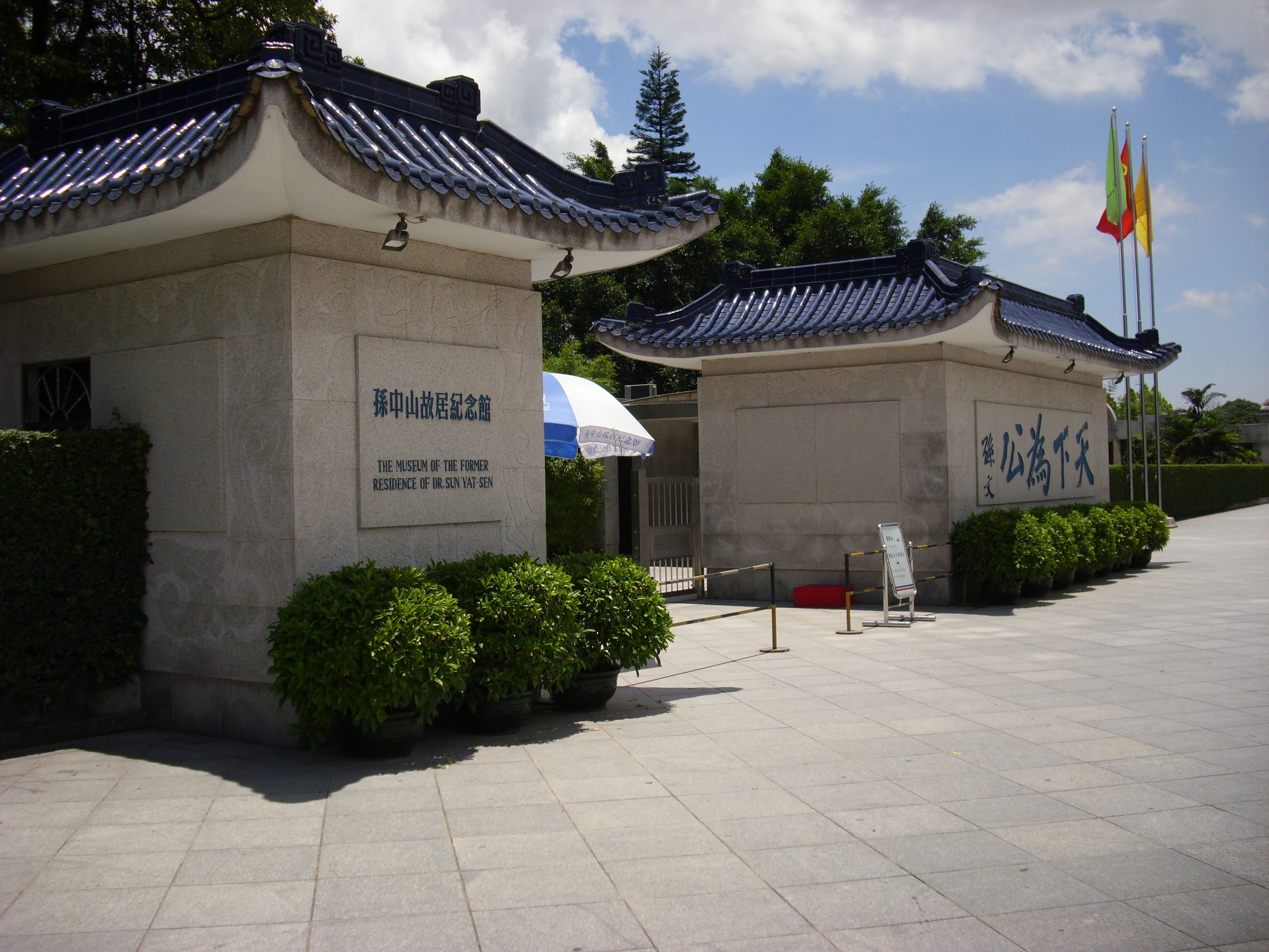 中文（香港）: 孫中山故居紀念館